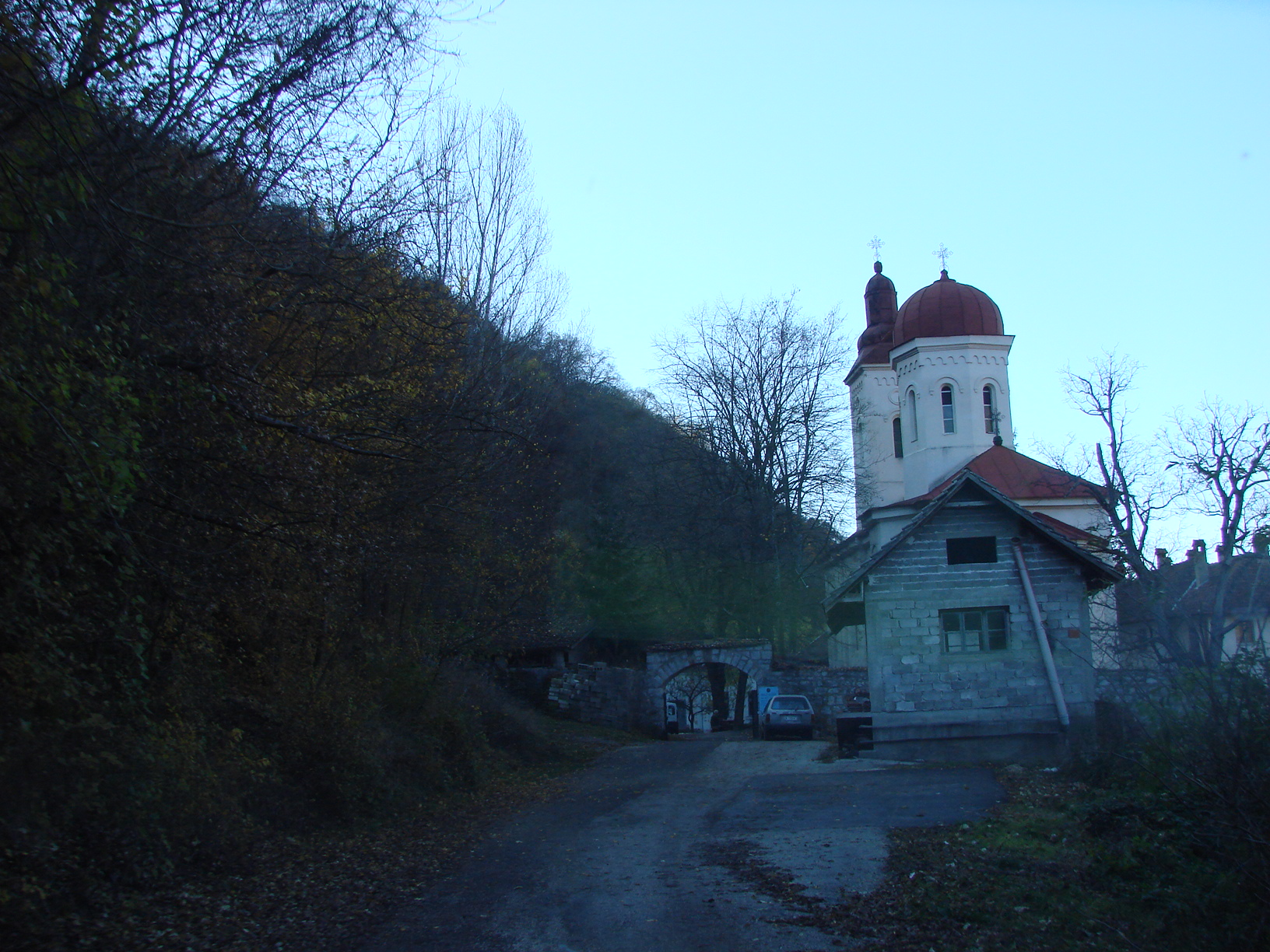 Суходолски манастир